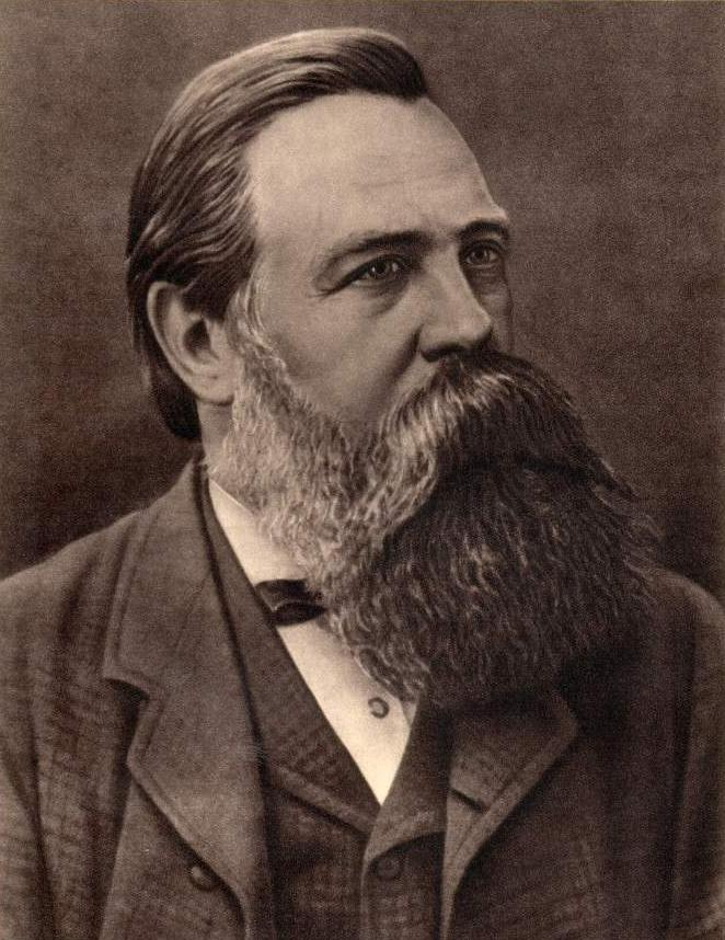 sujet: Friedrich Engels licence